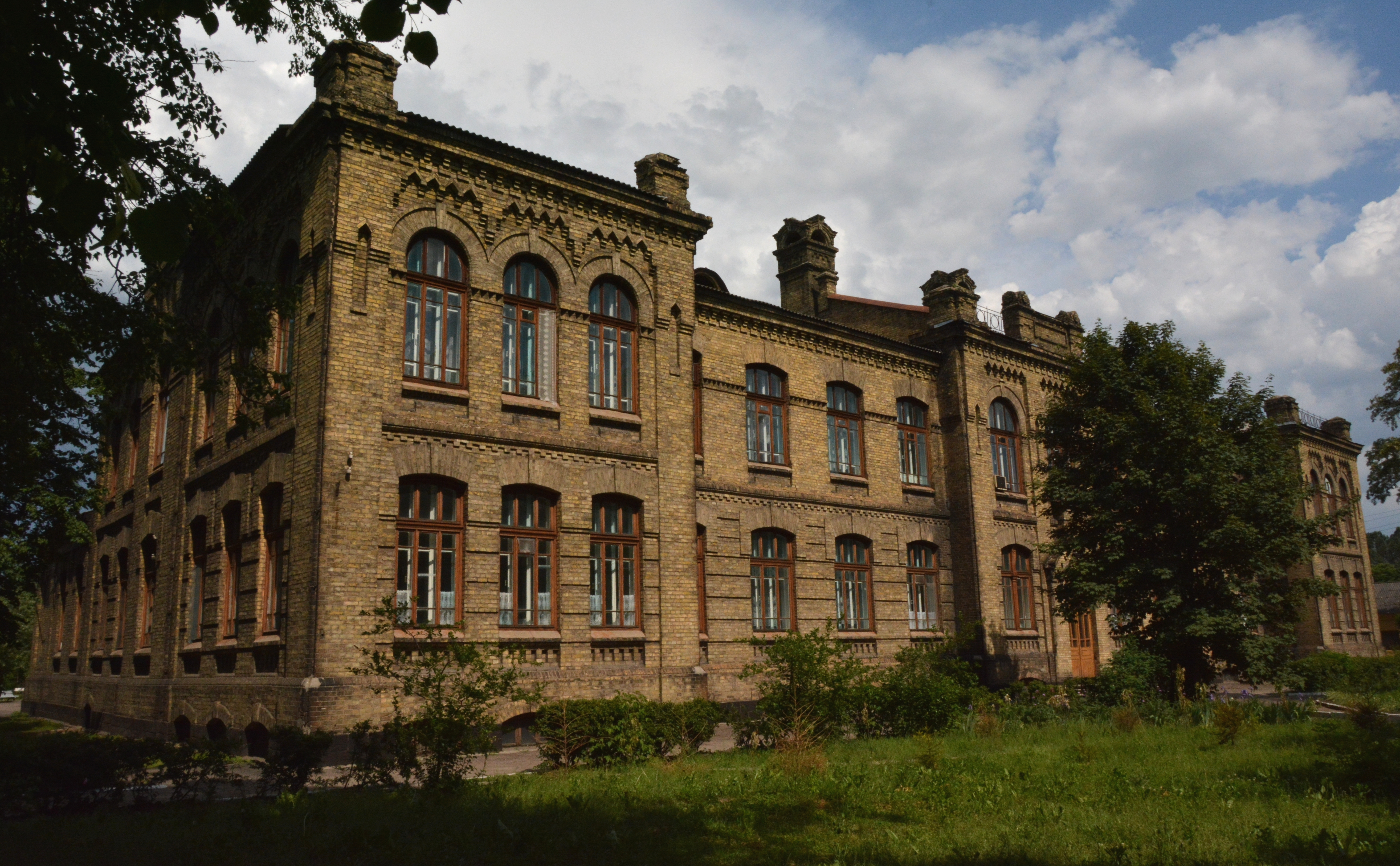 Головний корпус лікарні залізничників (мур.), Конотоп, вул. Садова, 98